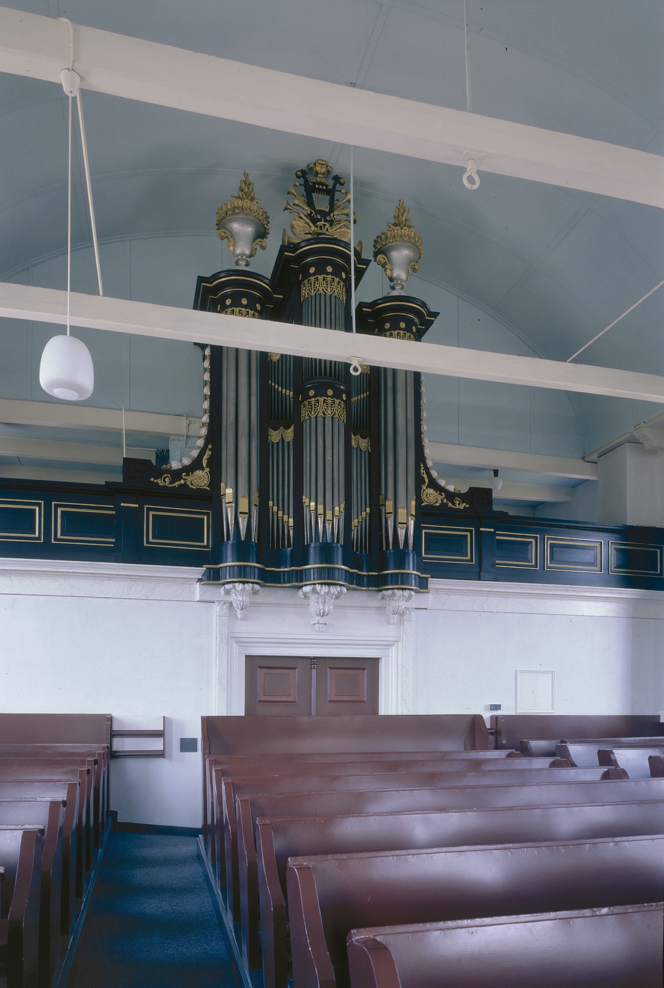 Hervormde kerk van Akkerwoude: Interieur, aanzicht orgel, orgelnummer 24 (opmerking: Gefotografeerd voor Het Historische Orgel in Nederland 1790-1818)